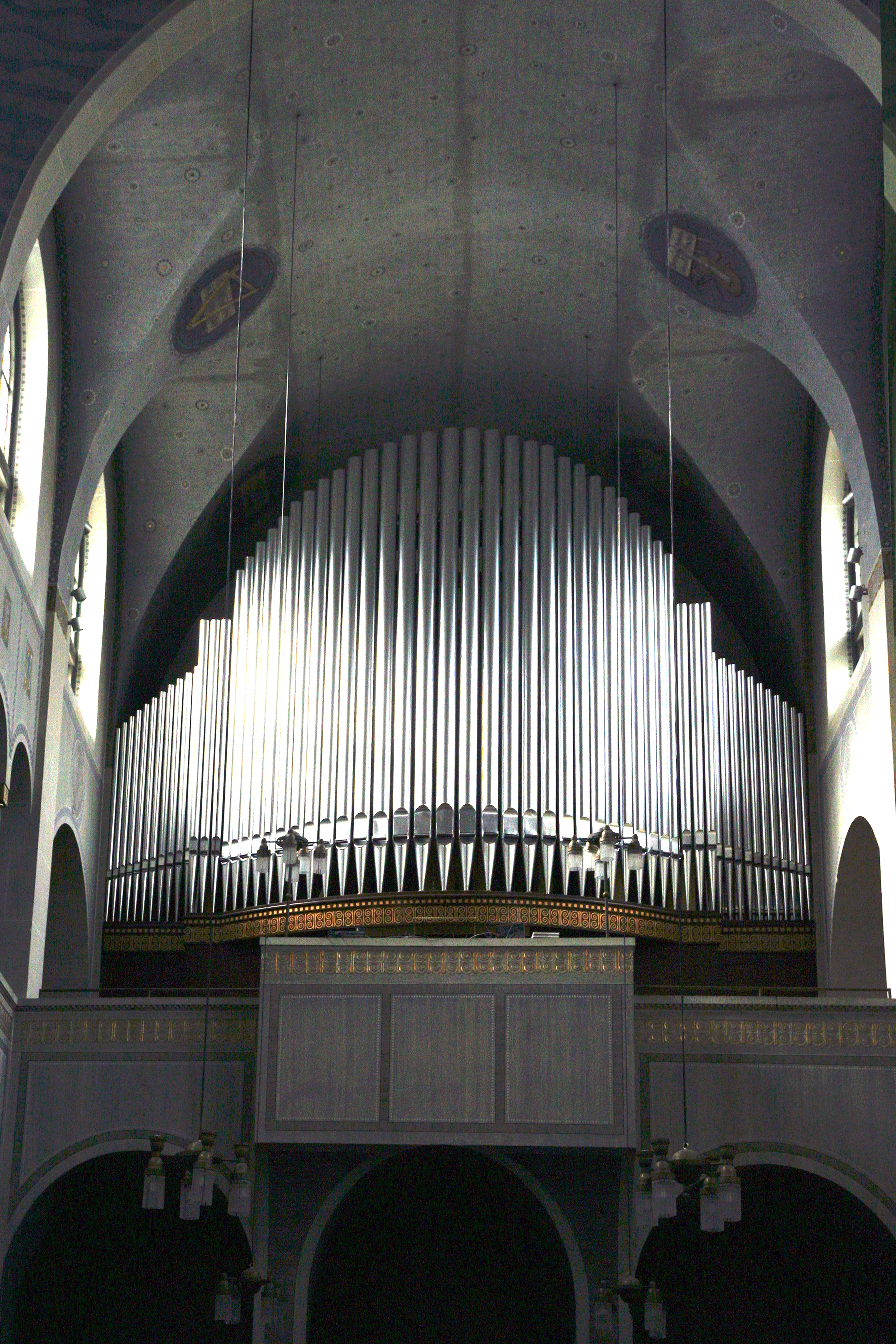 Römisch-katholische Pfarrkirche St. Bernhard Baden-Baden